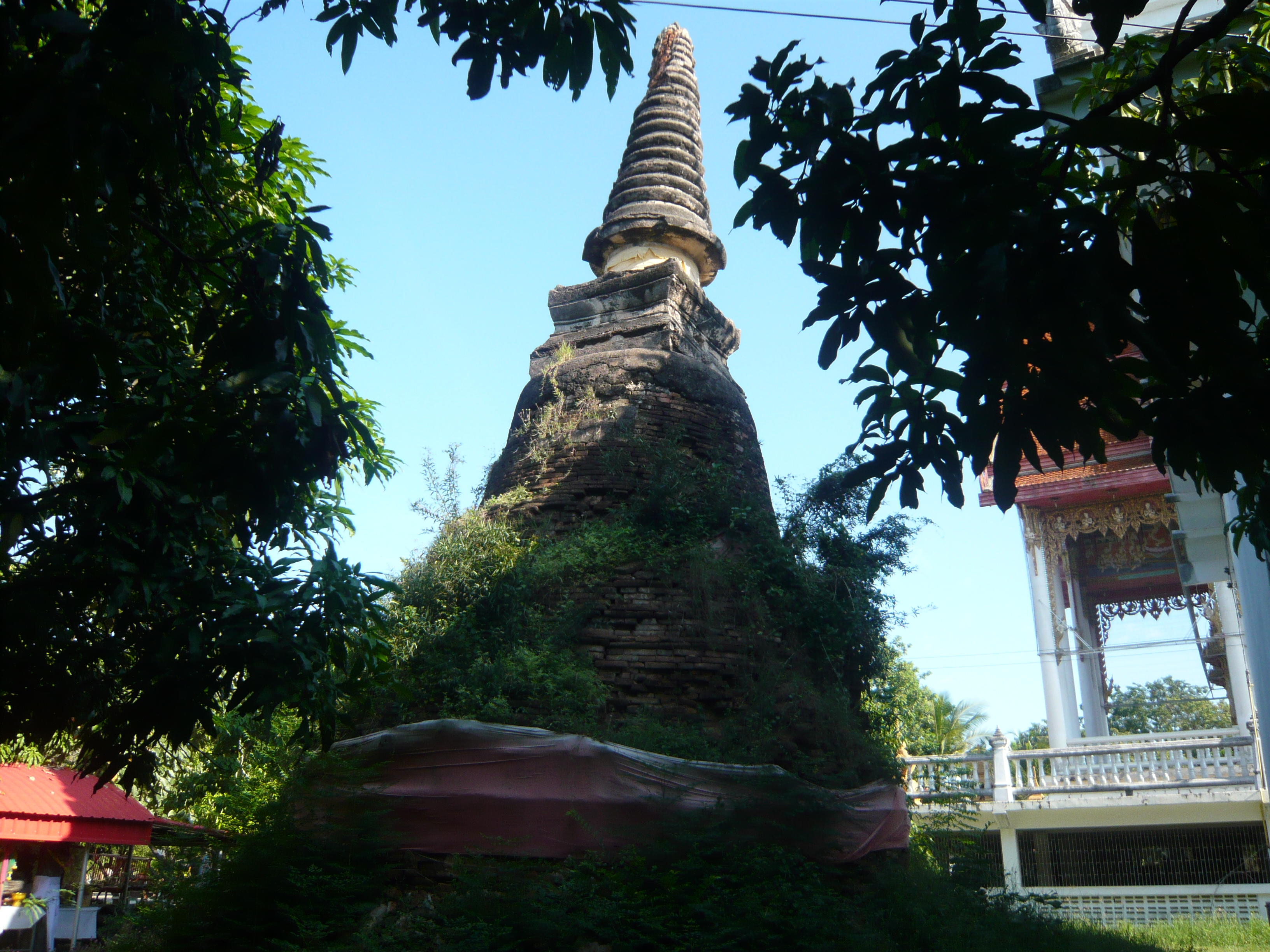 วัดบ้านทวน